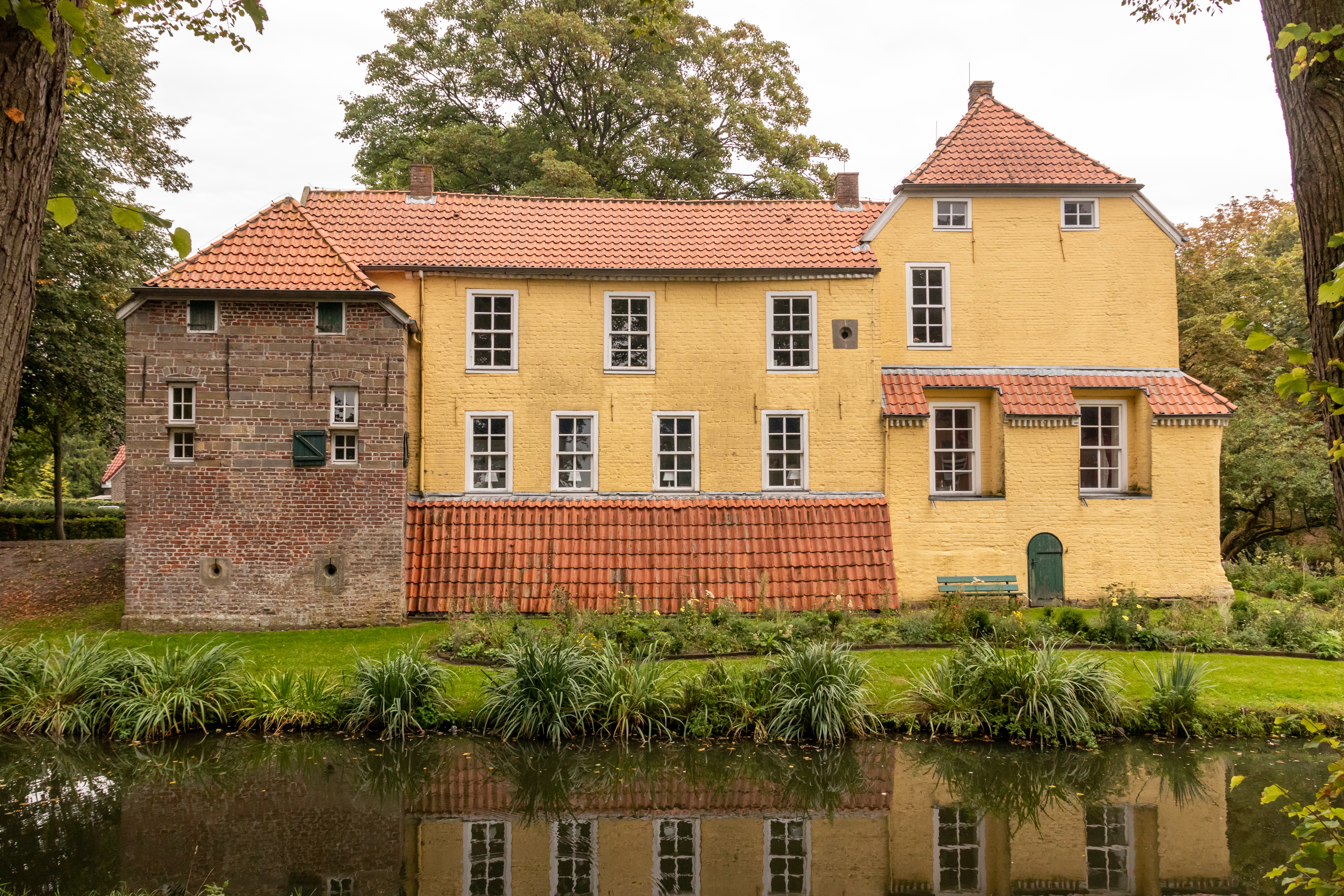 Manningaburg: Wasserburg („Alte Burg“) mit Brunnen und Epitaphe im Burghof sowie Graft und Baumbestand